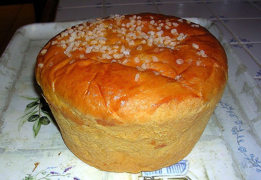 Pastís occità típic sobretot a la zona de la costa sud atlàntica.